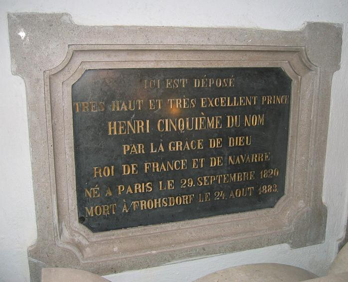 Tombe des Bourbons dans le couvent franciscain de Kostanjevica près de Nova Gorica.